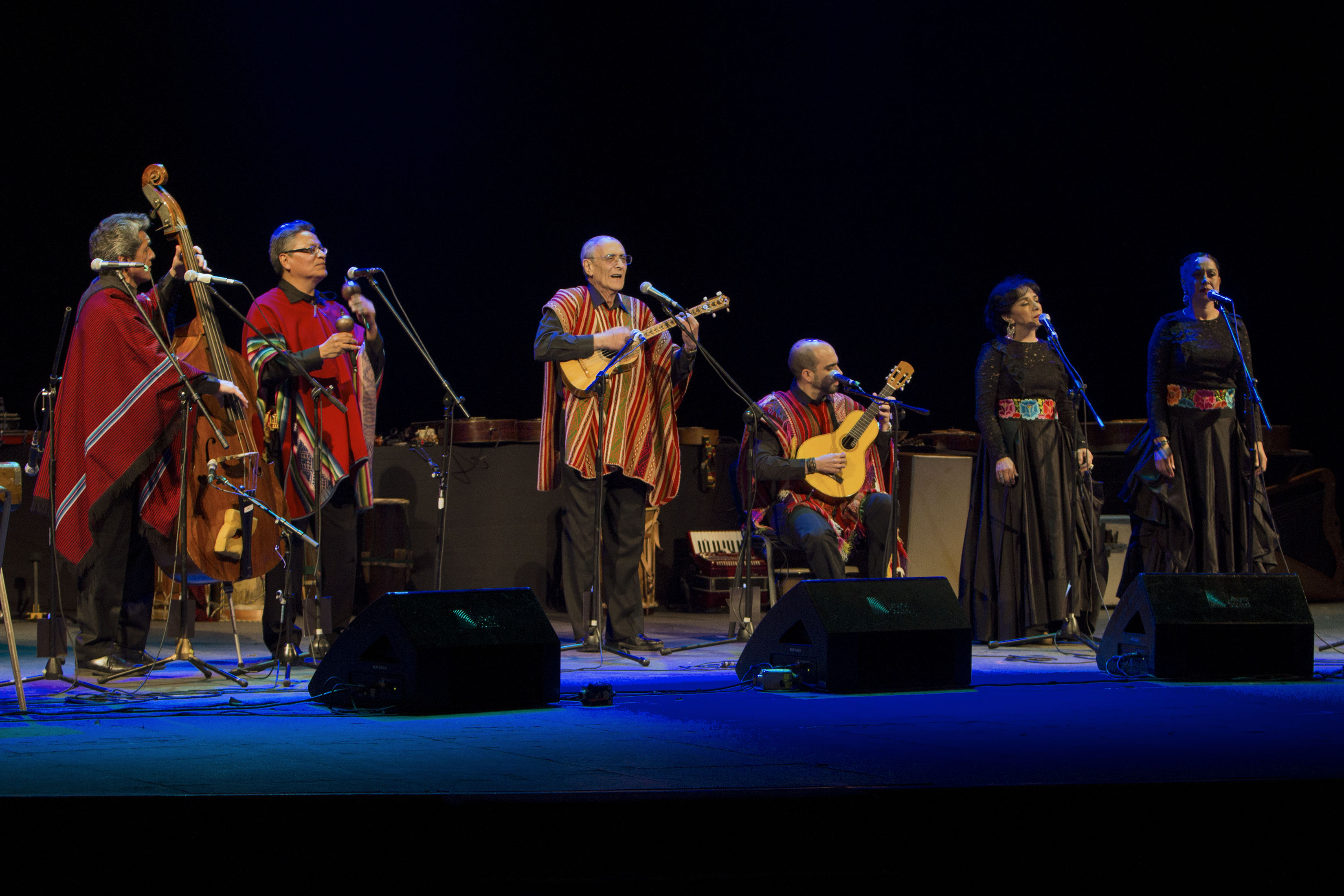 Domingo 27 de noviembre de 2016. Para celebrar sus 50 años de trayectoria, el grupo Los Folkloristas ofrecieron un concierto en el Teatro de la Ciudad esperanza Iris, donde interpretaron obras como La paloma y Tierra Mestiza. Fotografía: Maritza Ríos / Secretaría de Cultura de la CDMX.